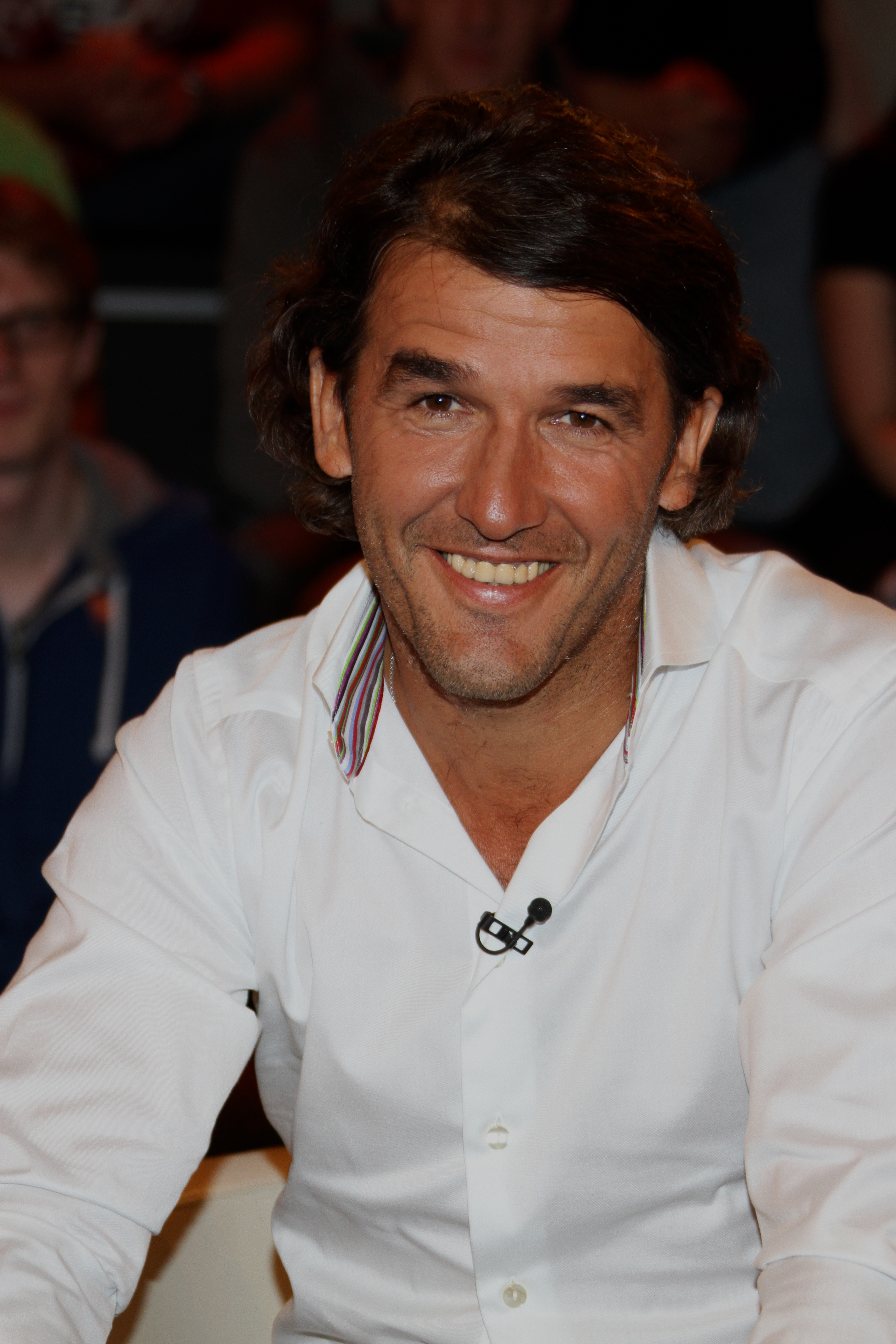 Karl-Heinz „Kalle“ Riedle (* 16. September 1965 in Weiler im Allgäu) ist ein ehemaliger deutscher Fußballspieler (Stürmer). Er spielte in der Bundesliga, der italienischen Serie A und in England in der ersten und zweiten Liga. Insgesamt erzielte er in 207 Bundesligaspielen 72 Tore. Inhaltsverzeichnis